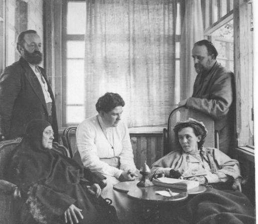 Павел Иванович Бирюков, Мария Николаевна Толстая, Александра Львовна Толстая, Анна Константиновна и Владимир Григорьевич Чертковы. Ясная Поляна.